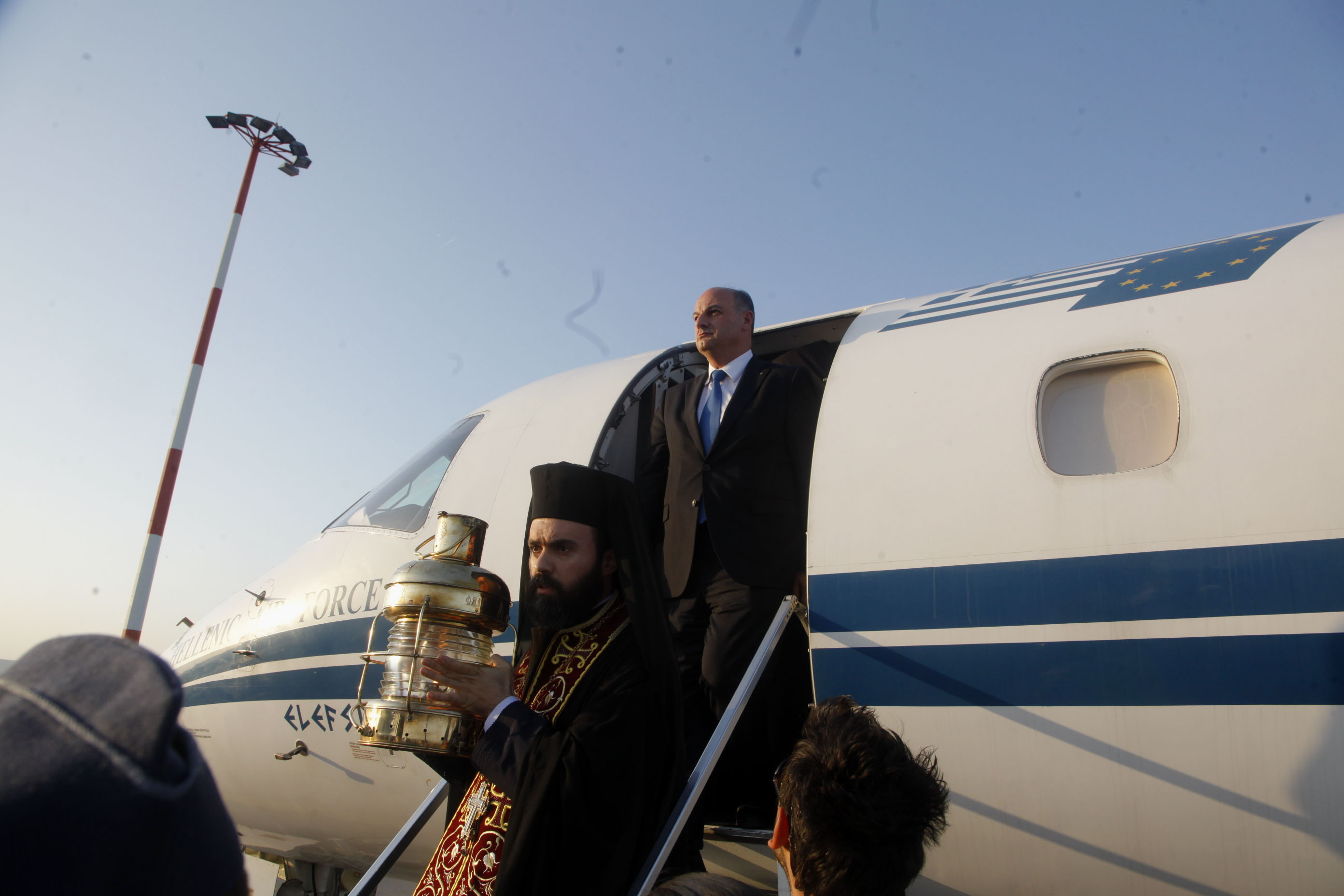 Eπιστροφή του Υφυπουργού Εξωτερικών Κώστα Τσιάρα στην Ελλάδα μετά την μετάβασή του στα Ιεροσόλυμα, όπου παρέστη στην Τελετή της Αφής του Αγίου Φωτός στον Ιερό Ναό της Αναστάσεως τo Μεγάλο Σάββατο 4 Μαΐου.